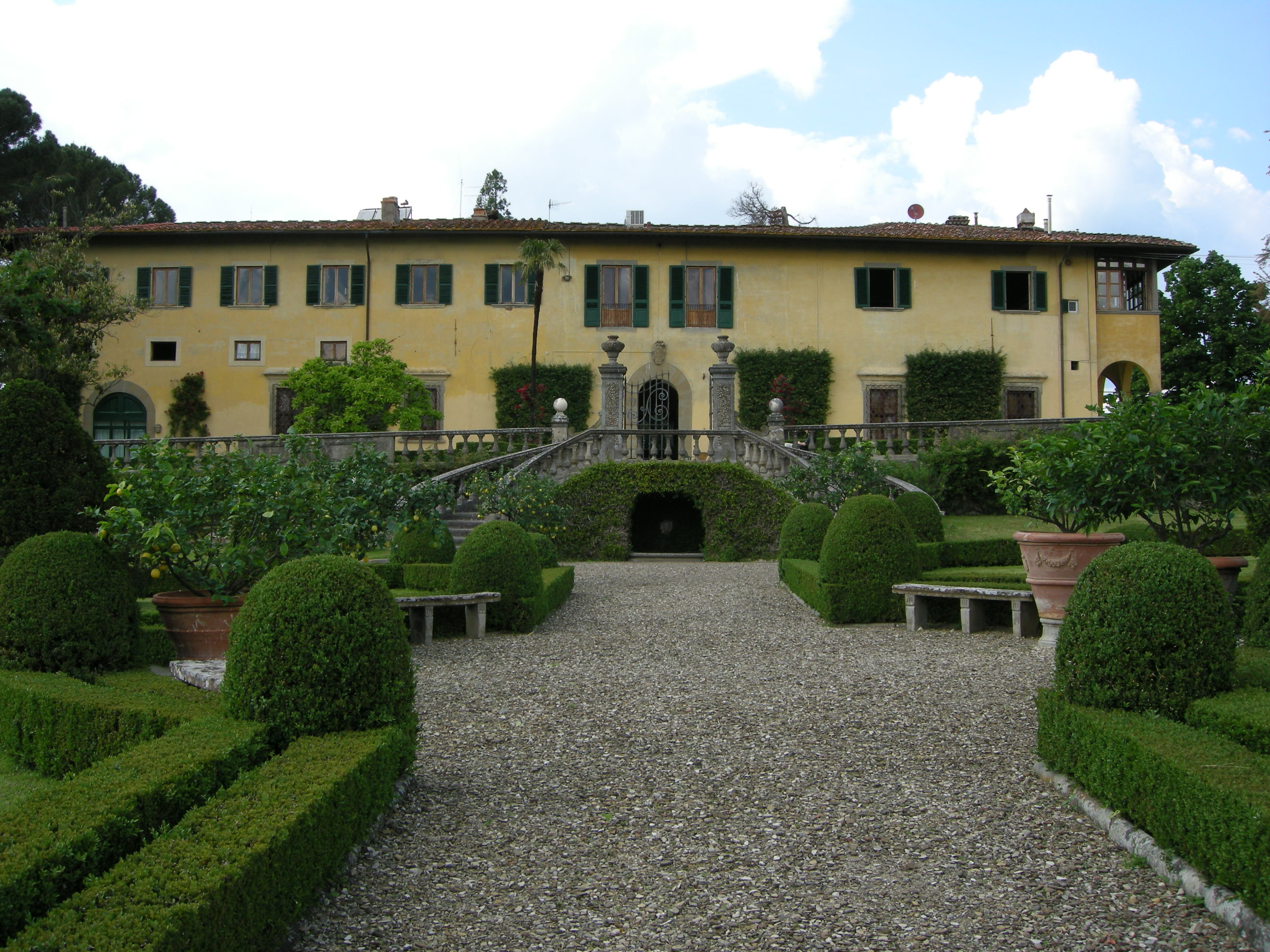 Villa il palagio di riomaggio